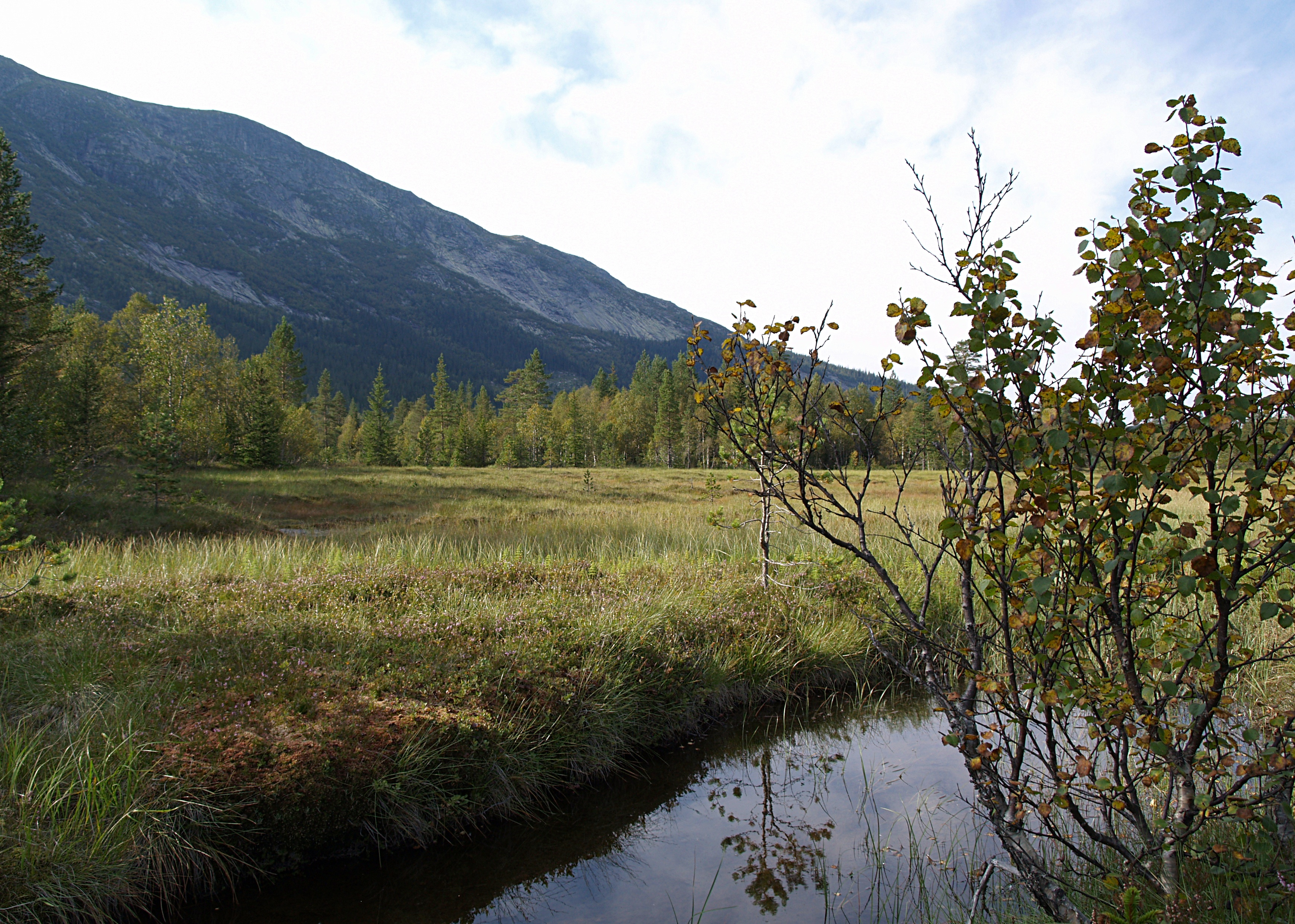 Vidalen